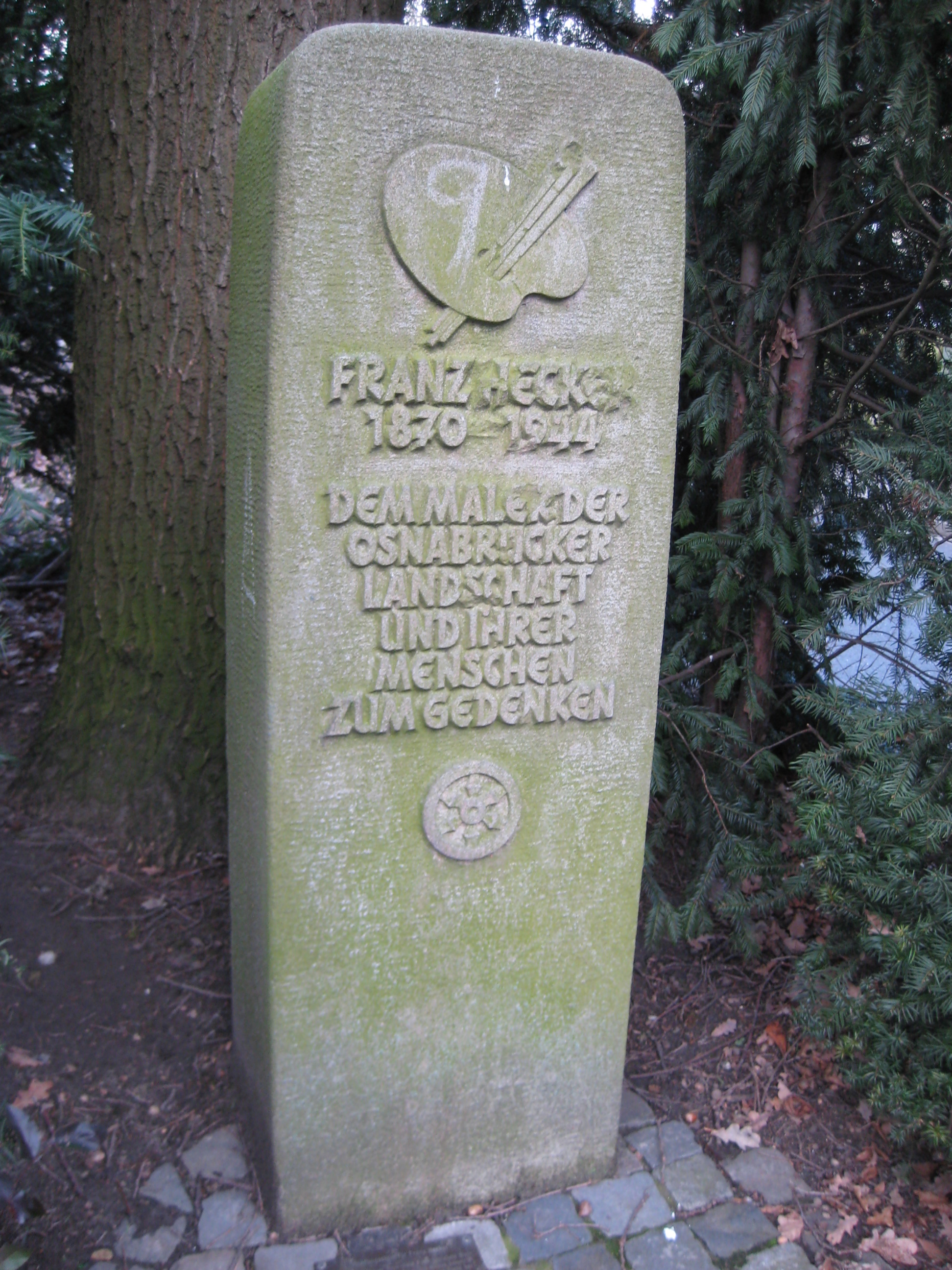 Fritz Szalinski (1905-1978): „Gedenkstein Franz Hecker“ in Osnabrück, Grünanlage am Riedenbach, Sandstein 1967